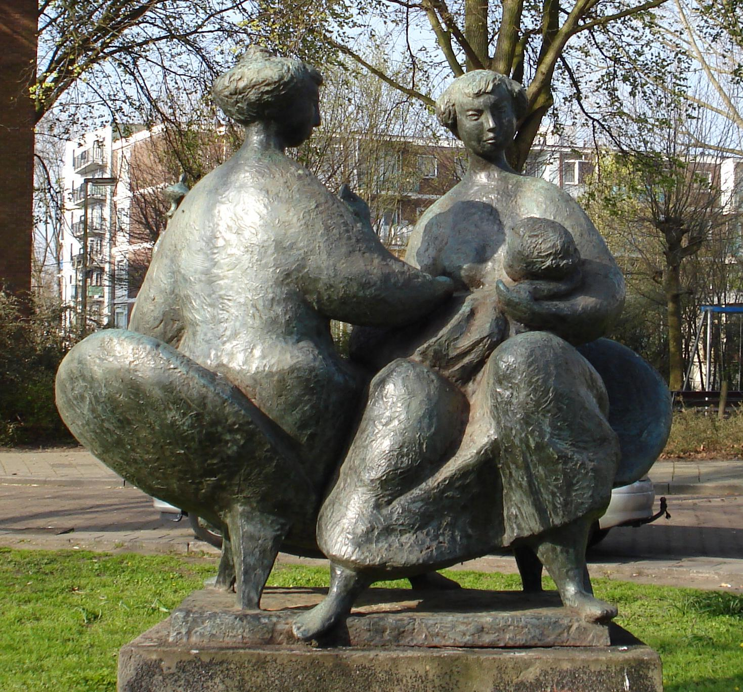 Den Haag, Eeldeplantsoen. Kunstwerk "Twee vrouwen en kind op bank" van Bram Roth. The Hague/The Netherlands.